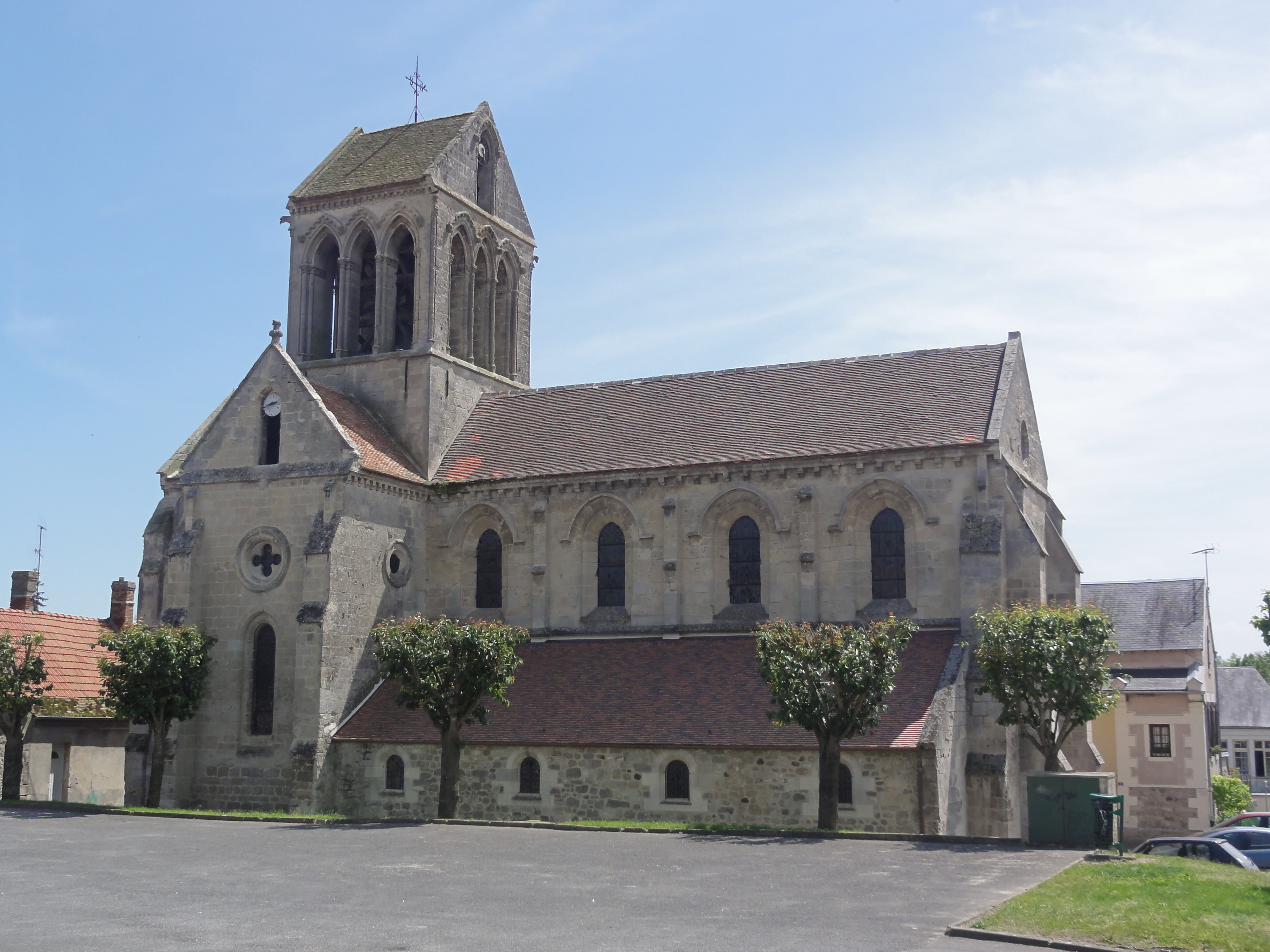 Bourg-et-Comin (Aisne) Église